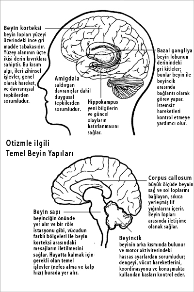 Major brain structures implicated in autism. - Otizmle ilgili temel beyin yapıları.